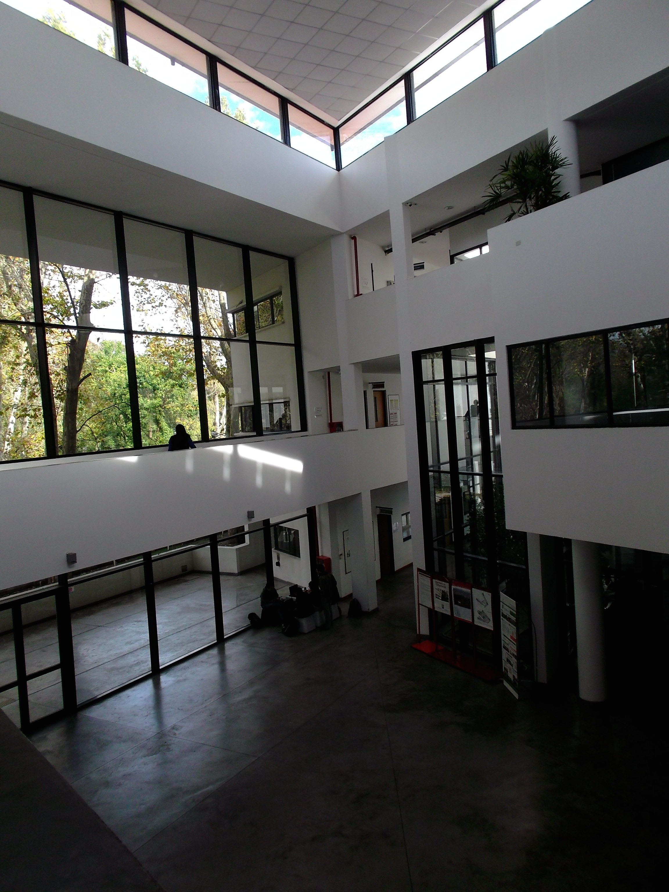 Facultad de Informática de la Universidad de La Plata. Hall central. Fotografía: Eric Hamilton.